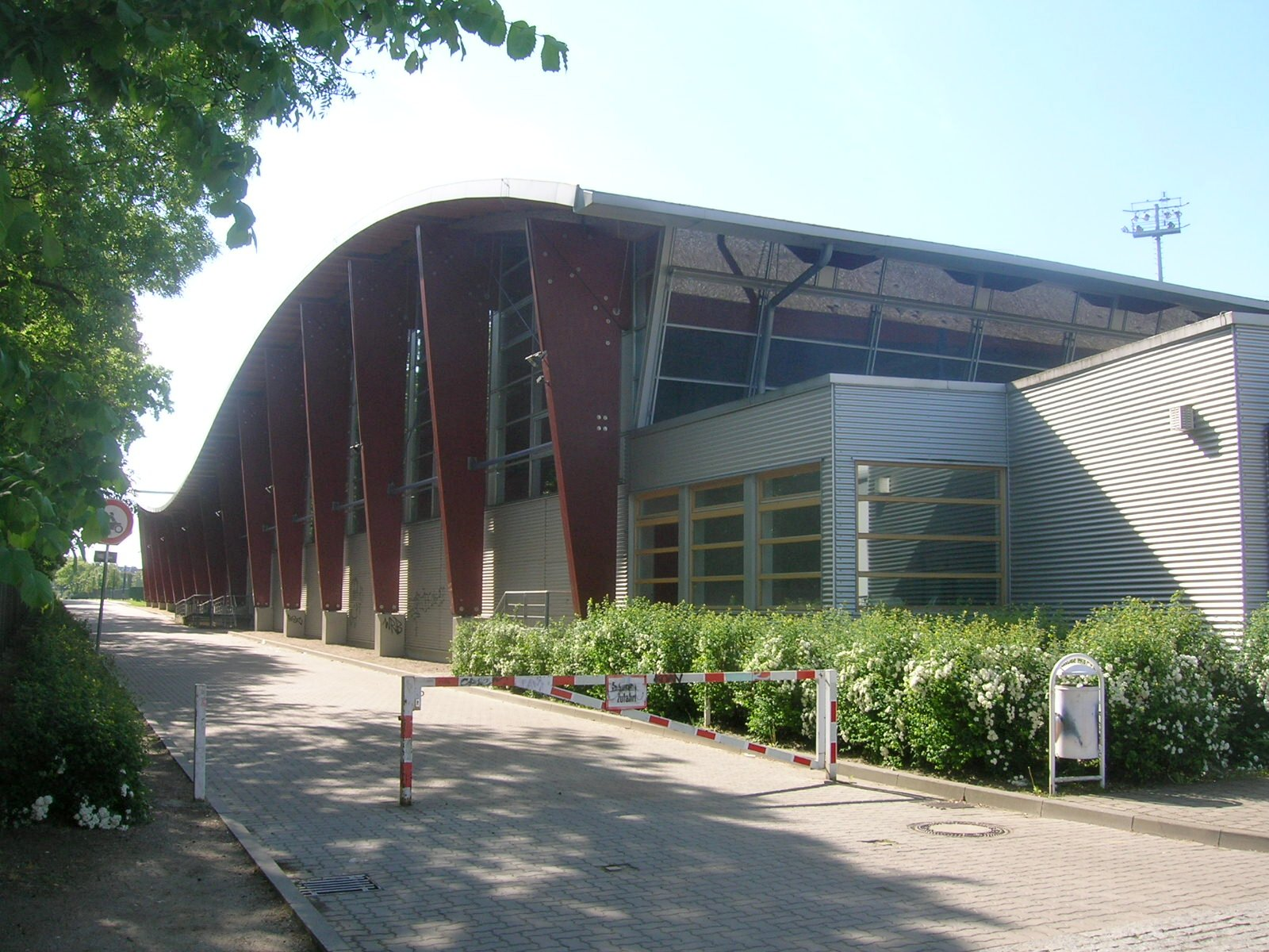 Sportforum Berlin in Berlin-Hohenschönhausen, Sport- und Werferhalle Lilli Henoch